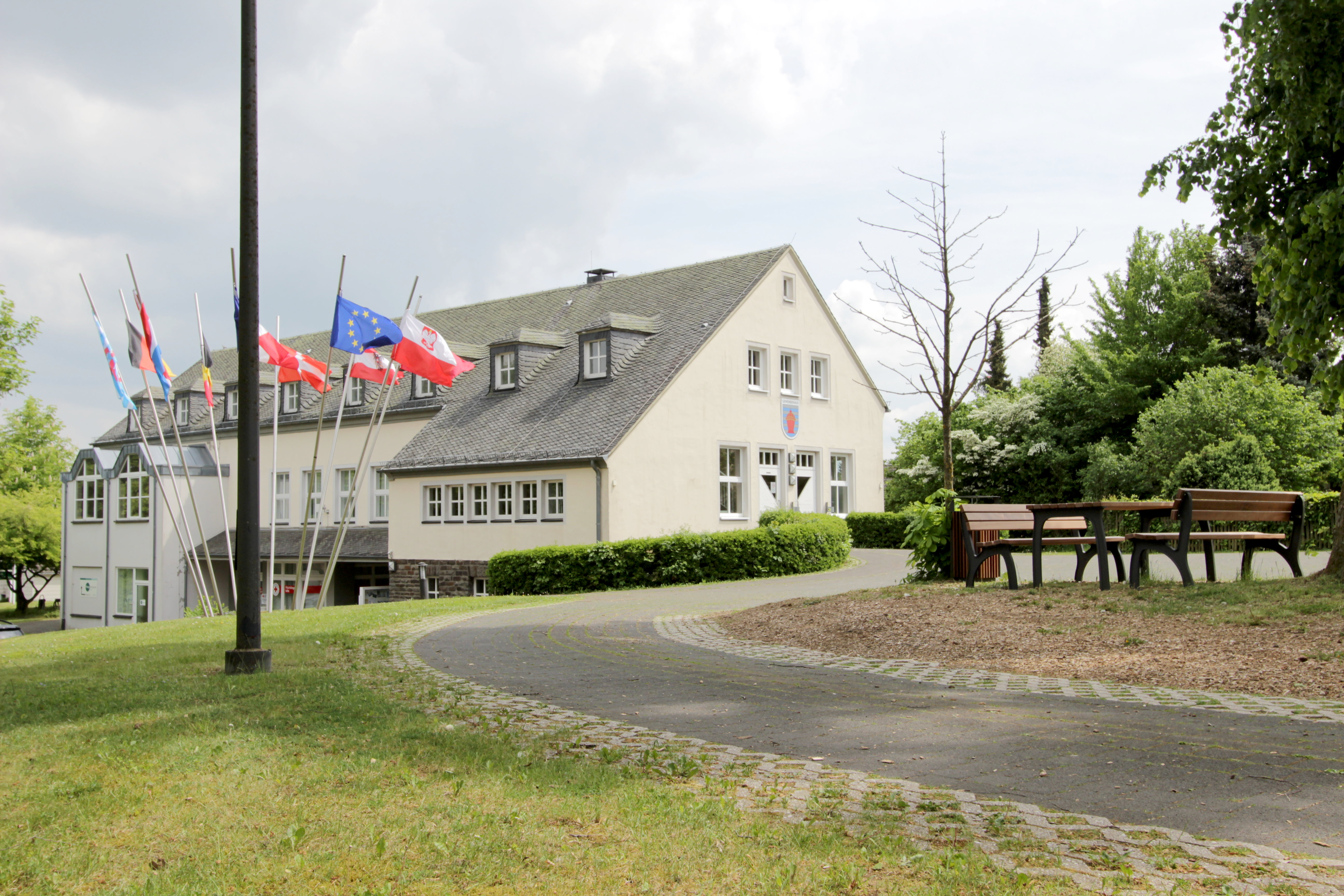 54687 Arzfeld, Luxemburger Straße 5. Dorfgemeinschaftshaus mit integrierter Touristeninformation und Park. Aufnahme von 2018.